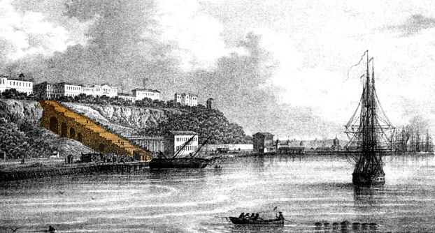 Odessa Hafen 1850